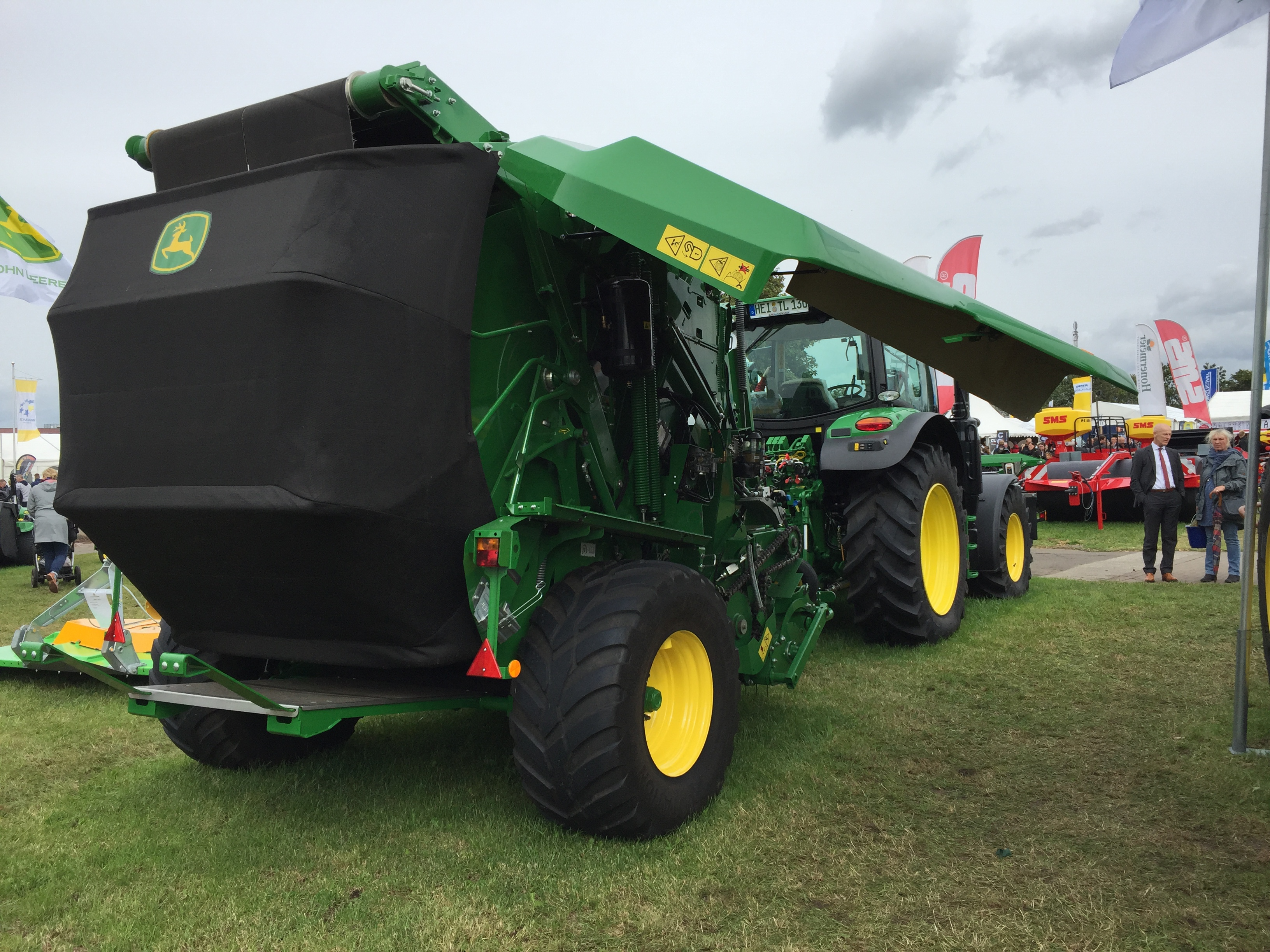 John Deere - Ballenpresse